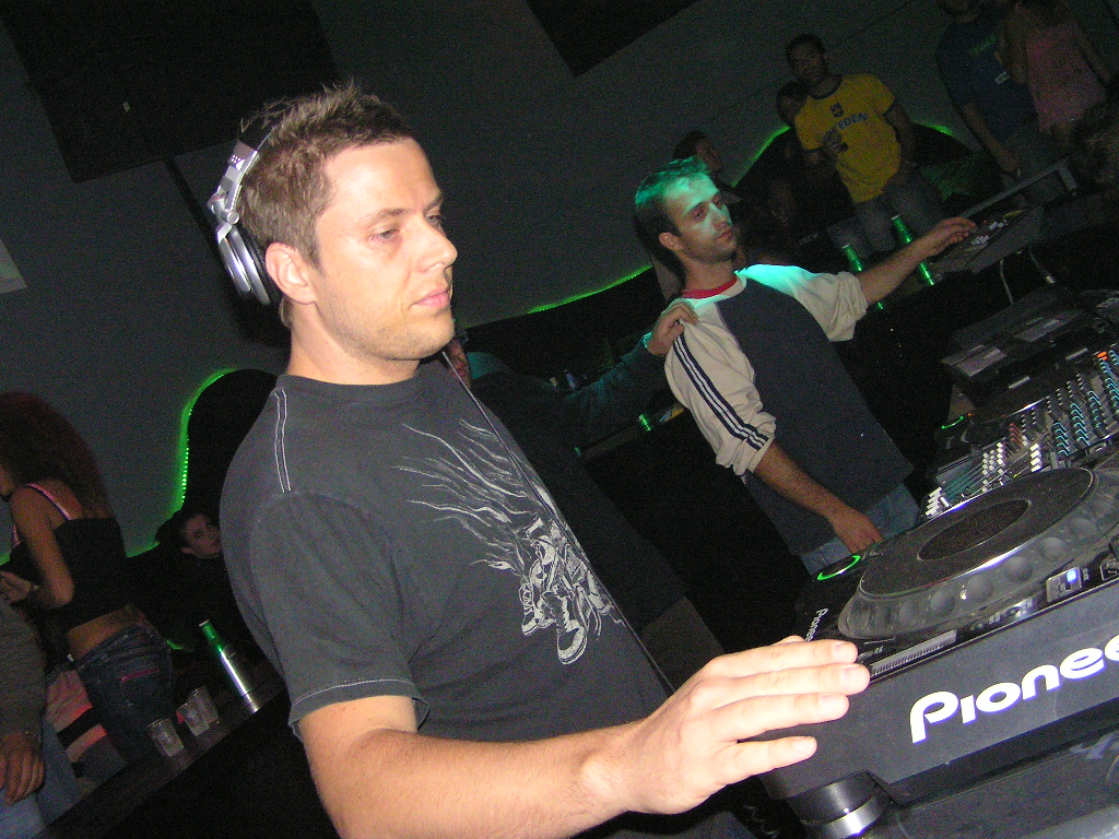 Jimmy Van M @ Luv